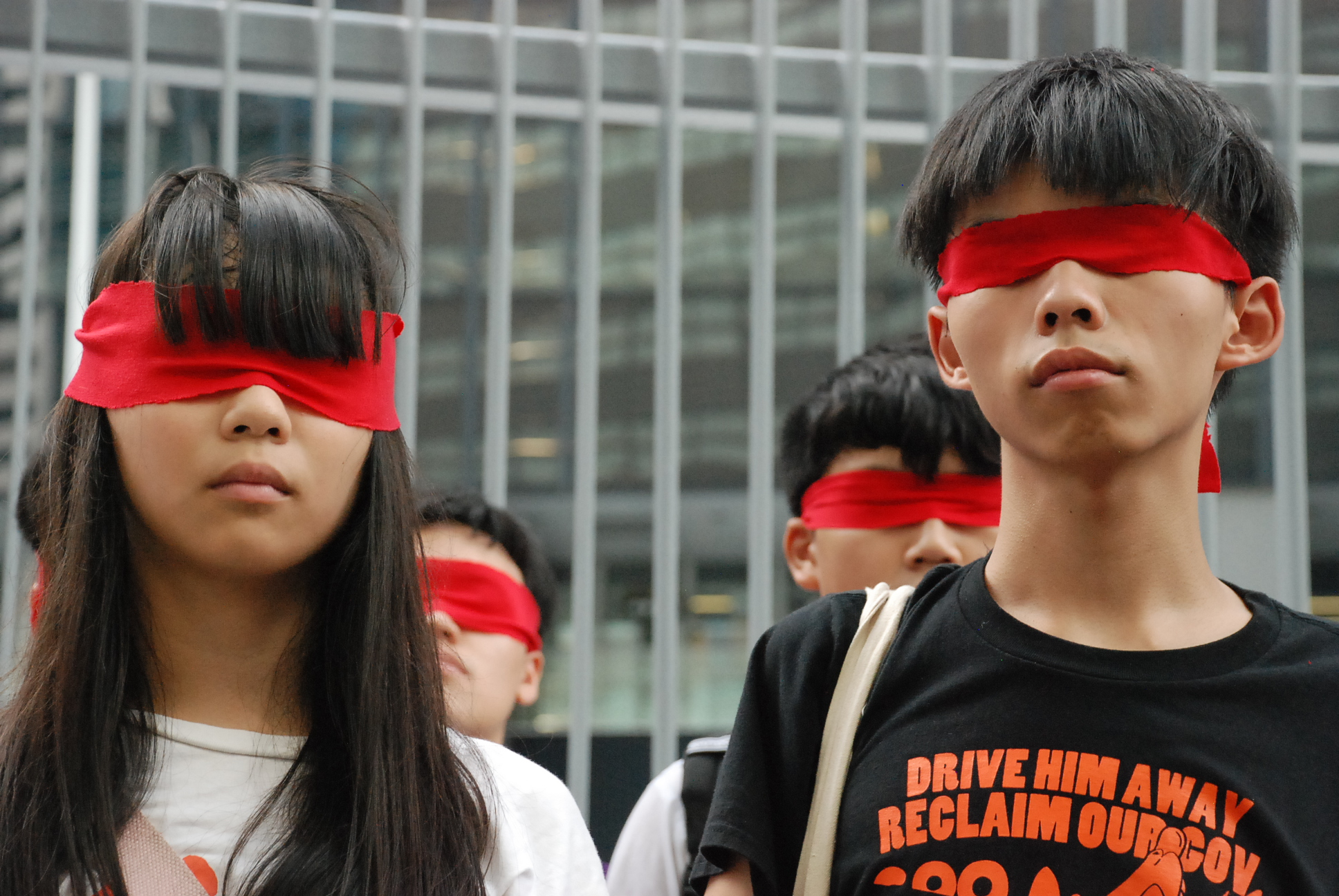 學民思潮發言人周庭(左)及召集人黃之鋒以紅布蒙眼，代表中國的紅色政權蒙蔽學生